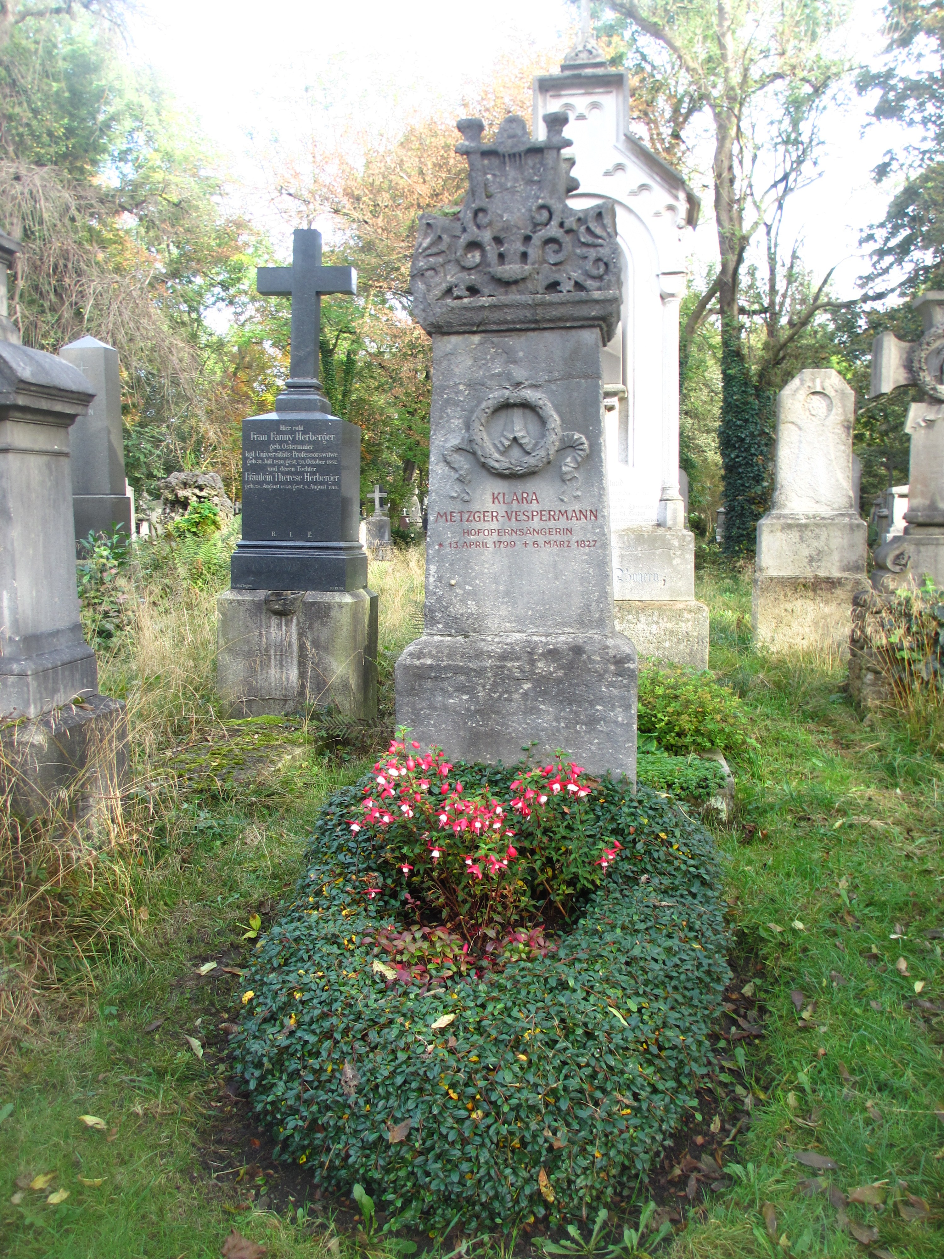 Die Grabstätte von Klara Vespermann befindet sich auf dem Alten Südlichen Friedhof in München (Gräberfeld 18 - Reihe 14 - Platz 11).